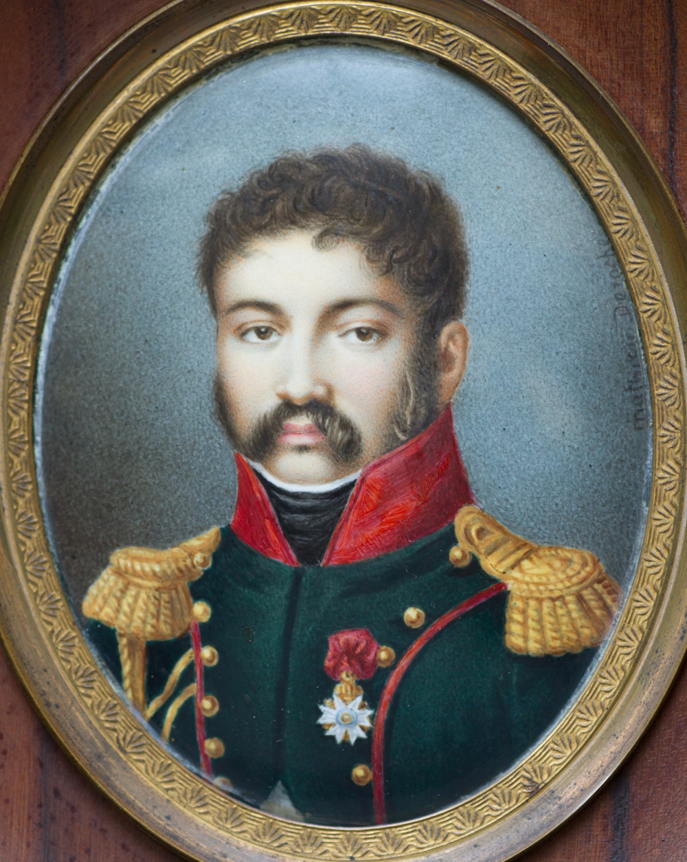 Hercule CORBINEAU. 1780-1823. Portrait posthume sur un médaillon peint par Mathieu Deroche (39 Boulevard des Capucines à Paris).